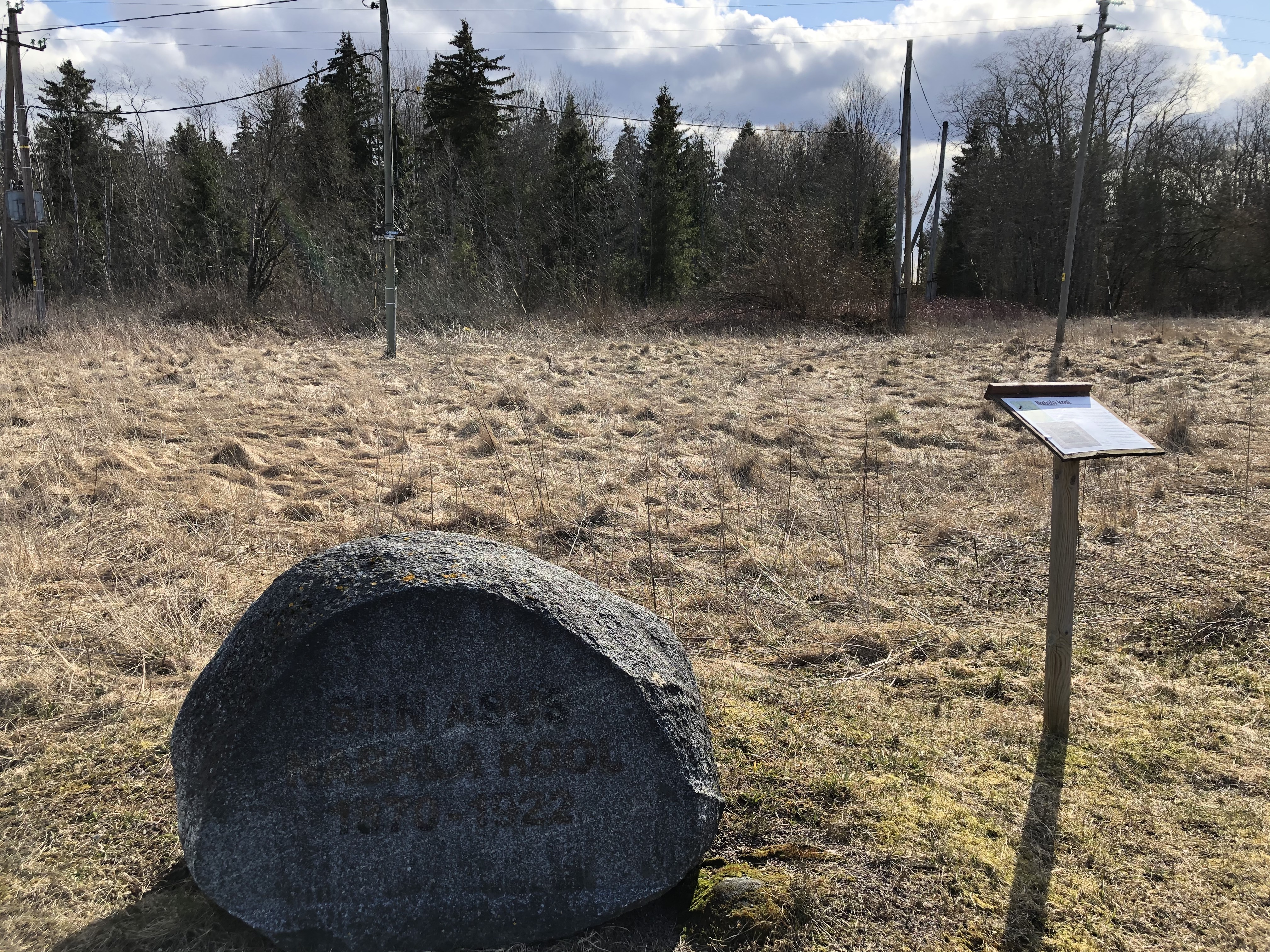 Mälestuskivi, Kurevere